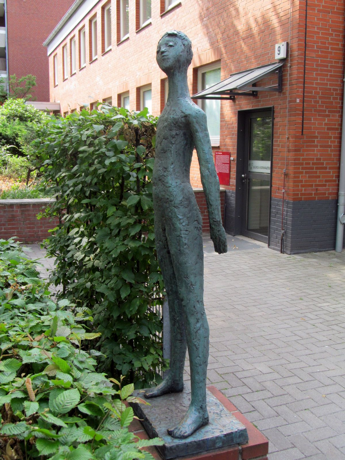 Bronzeskulptur Stehendes Mädchen (1957) von Sabine von Diest-Brackenhausen vor der Schule Wielandstraße in Hamburg-Eilbek